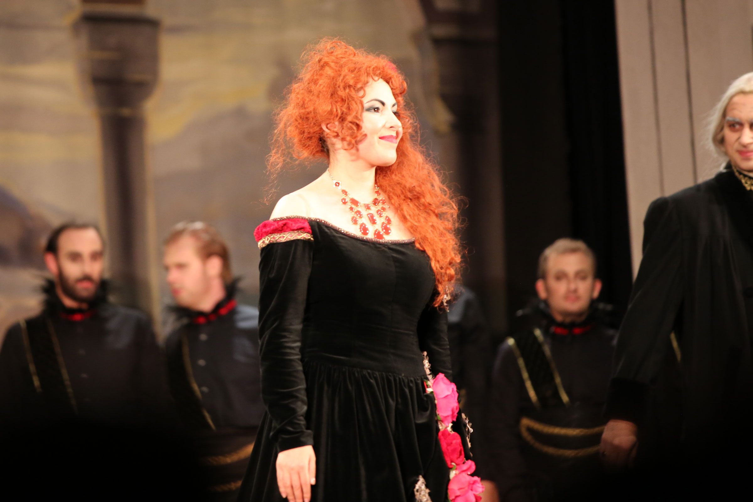 Khayrullova_Ilseyar-Maddalena-7749